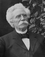 Fotografisches Bildnis des Dr. August Meyer